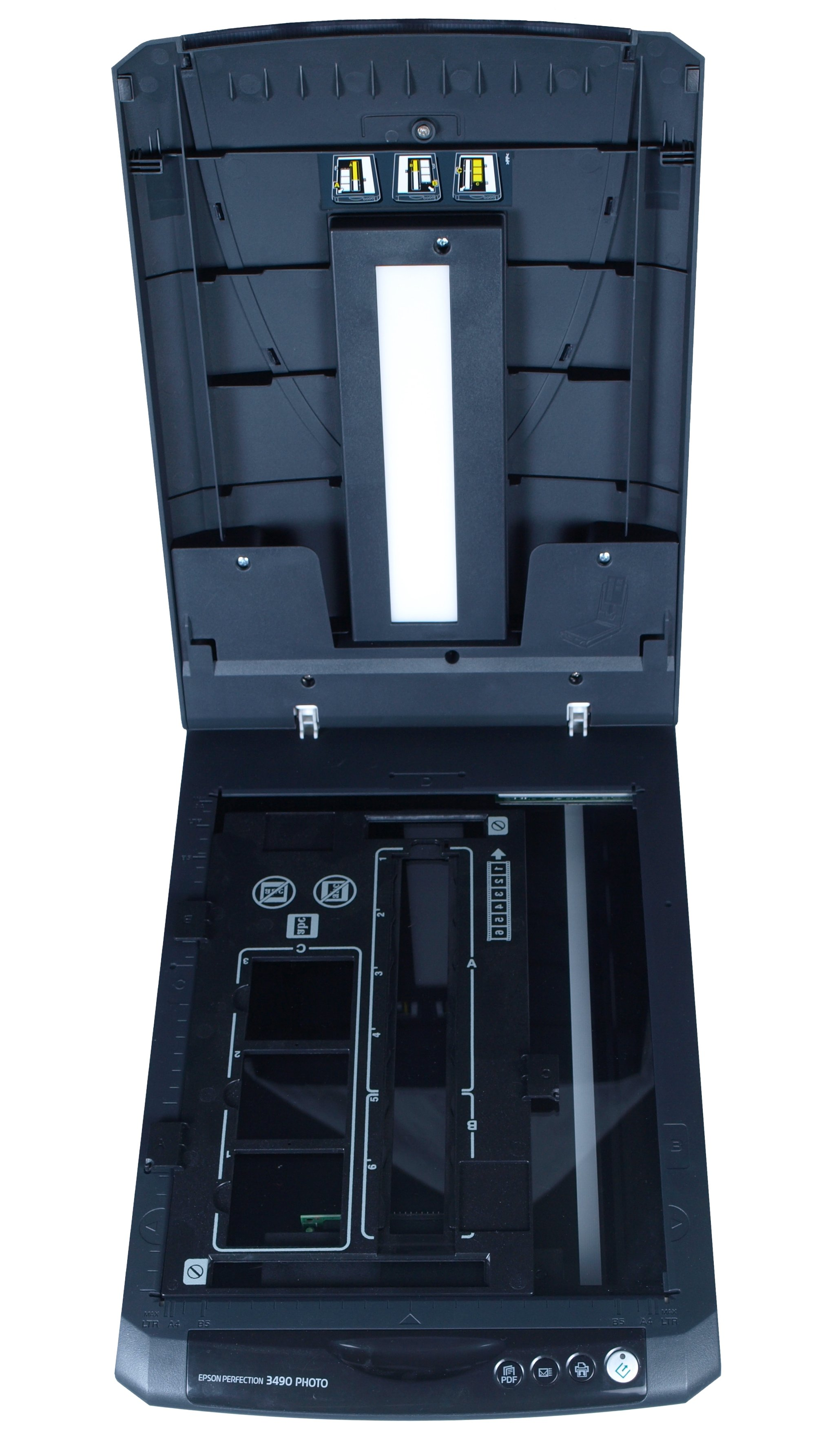 Flachbettscanner mit integrierter Durchlichteinheit und Aufsatz zum Scannen von Negativen im Kleinbildformat